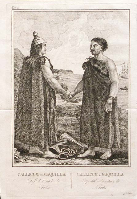 Abbildung aus der italienische Ausgabe, Neapel 1796